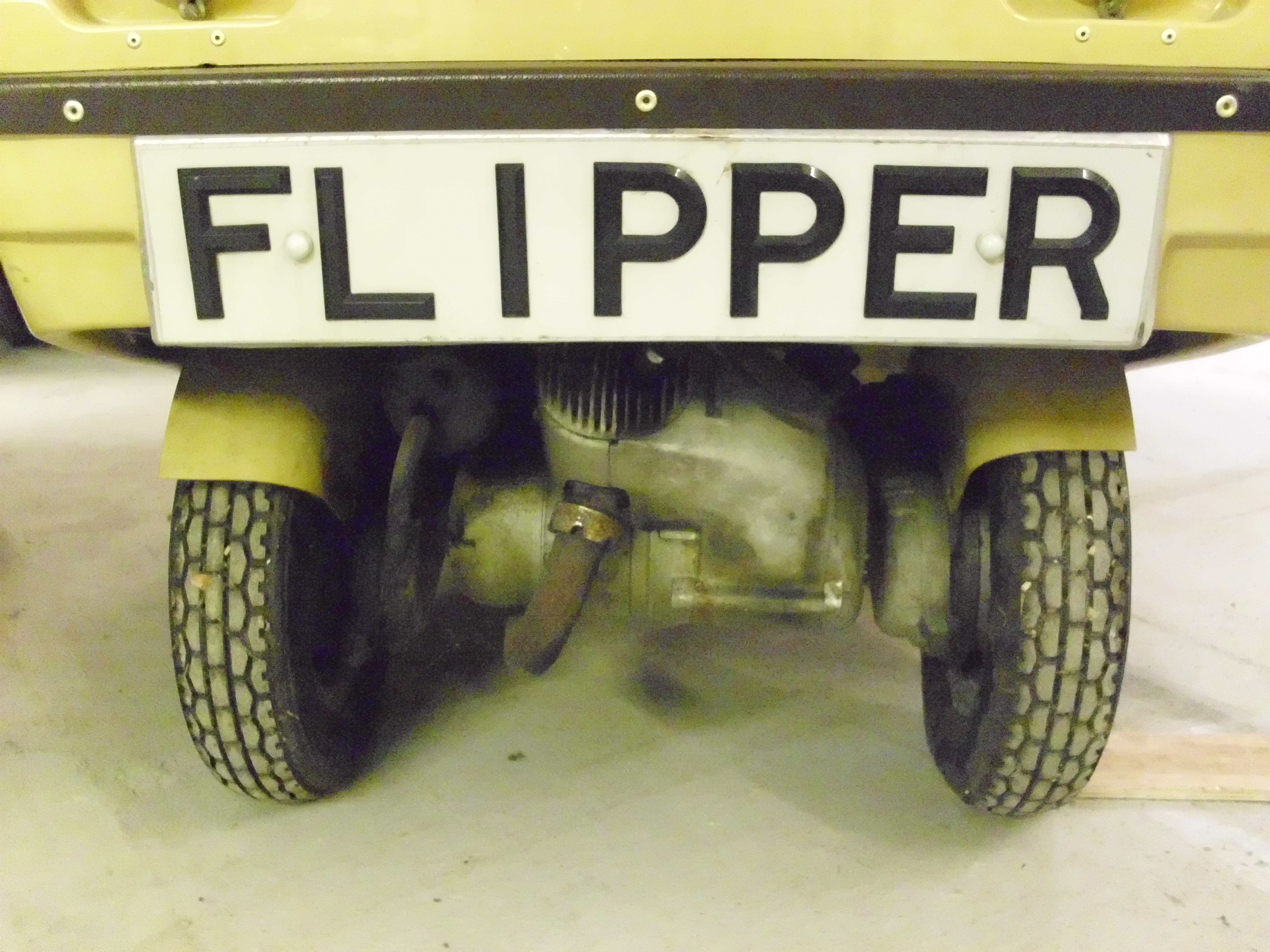 Flipper I